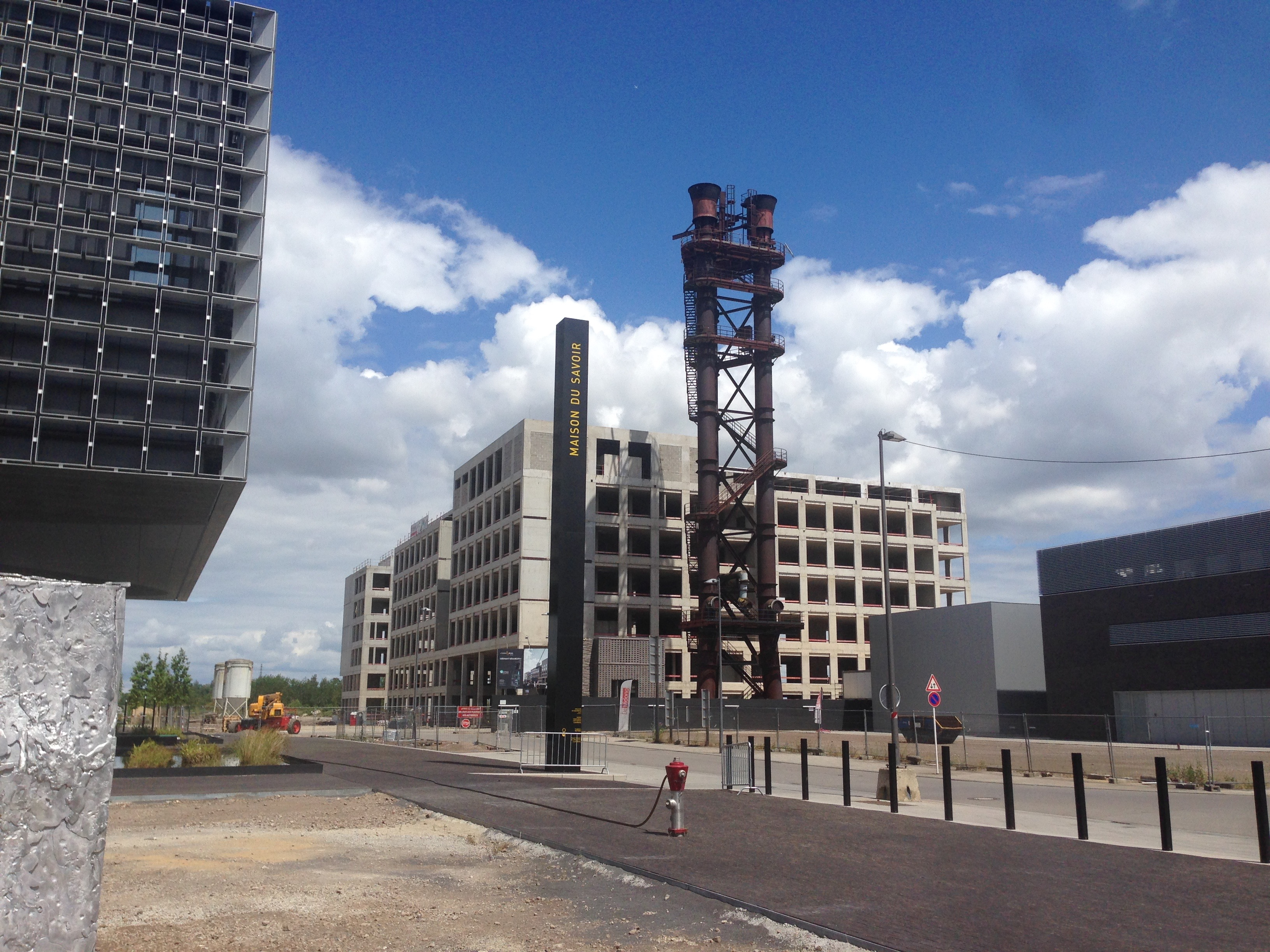 Universität Luxemburg in Esch an der Alzette